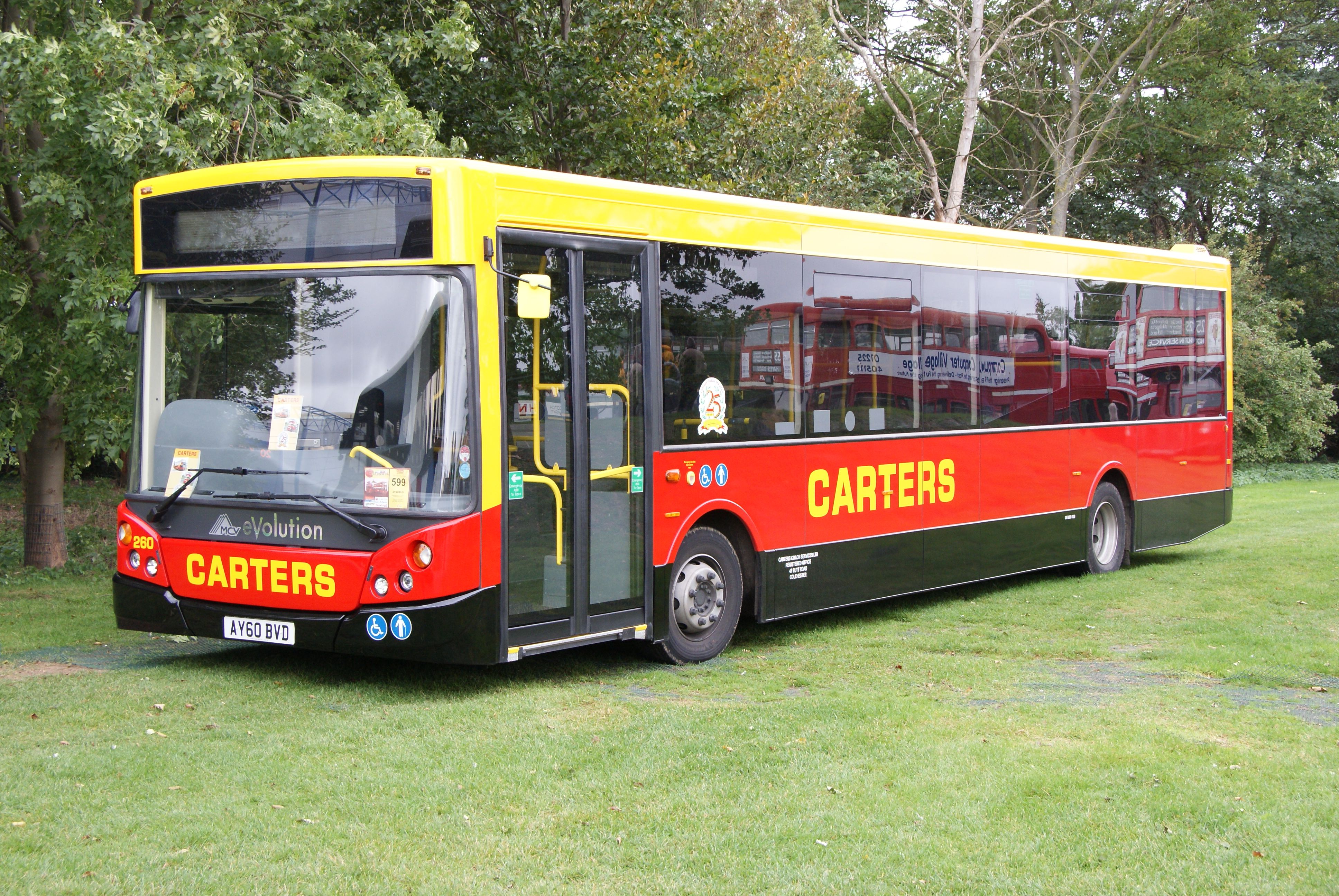 AY60BVD-1 260910 CPS